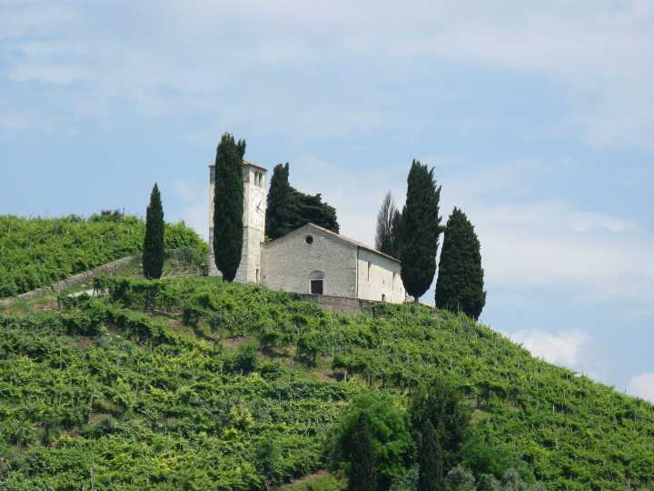 Chiesa di San Vigilio, con intorno vitigni coltivati a Prosecco.